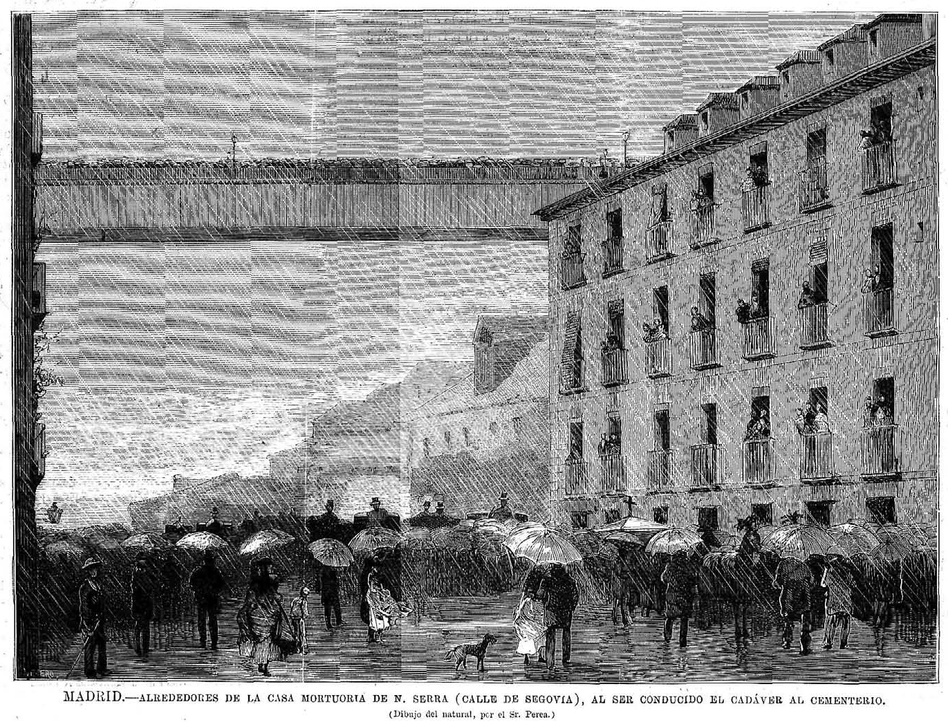 Madrid. Alrededores de la casa mortuoria de N. Serra (calle de Segovia), al ser conducido el cadáver al cementerio (dibujo del natural, por el Sr. Perea), en la revista española La Ilustración Española y Americana.